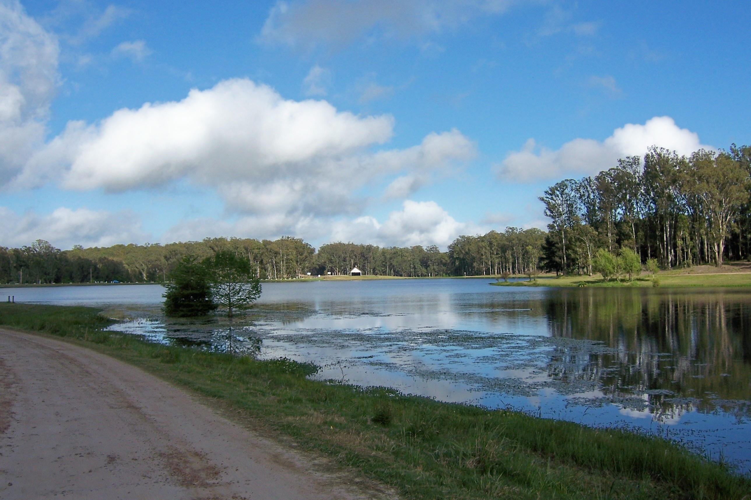 Vista de uno de los lagos artificiales del Balneario Iporá, Tacuarembó, Uruguay.